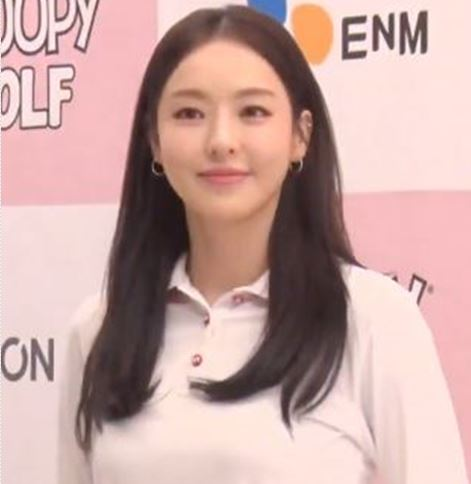 배우 이다희가 28일 오후 서울 영등포구 신도림동 현대백화점 디큐브시티점에서 열린 골프웨어 브랜드 '스누피 골프(SNOOPY GOLF)' 팬사인회에 참석해 포토타임을 가졌다.